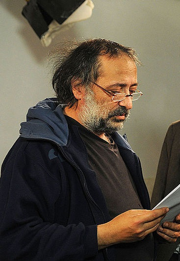 Pedro Saborido humorista y guionista